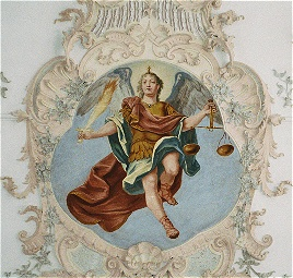 Erzengel Michael in der Pfarrkirche St. Laurentius und Elisabeth (St. Laurentius und St. Elisabeth) in Aulzhausen (Bayern) Beschreibung: Michael dargestellt als endzeitlicher Seelenwäger (mit Feuerschwert und Seelenwaage) am Tag des Jüngsten Gerichts - als Hinweis auf Christi Anweisung an die Apostel „... und ihr werdet meine Zeugen sein bis an das Ende der Welt“ (Apg. 1,8) Künstler: Johann und Ignaz Finsterwalder (Stuck), Asam-Schüler Christoph Thomas Scheffler (Fresko)